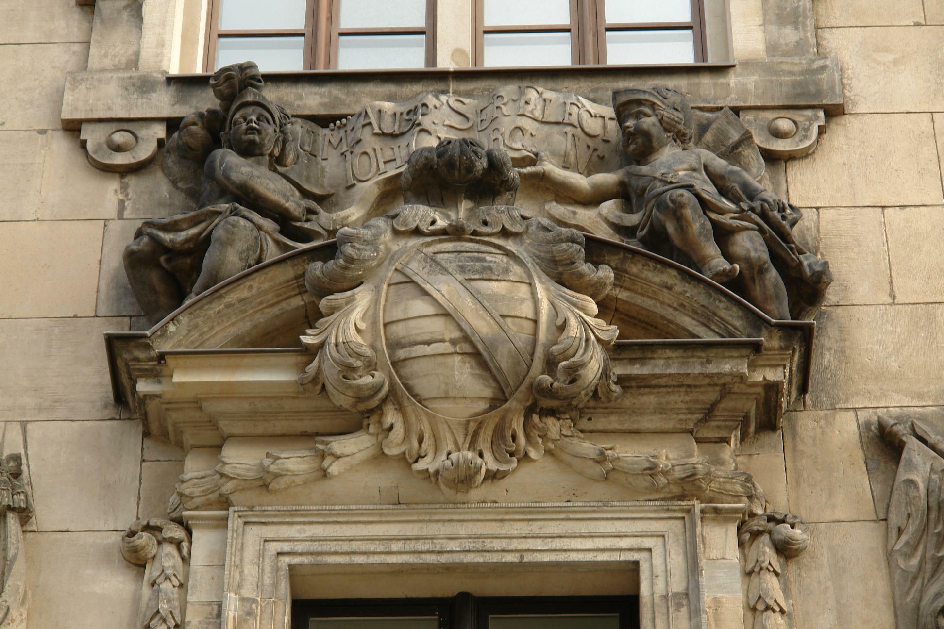 Grünes Tor am Residenzschloss (Detail)